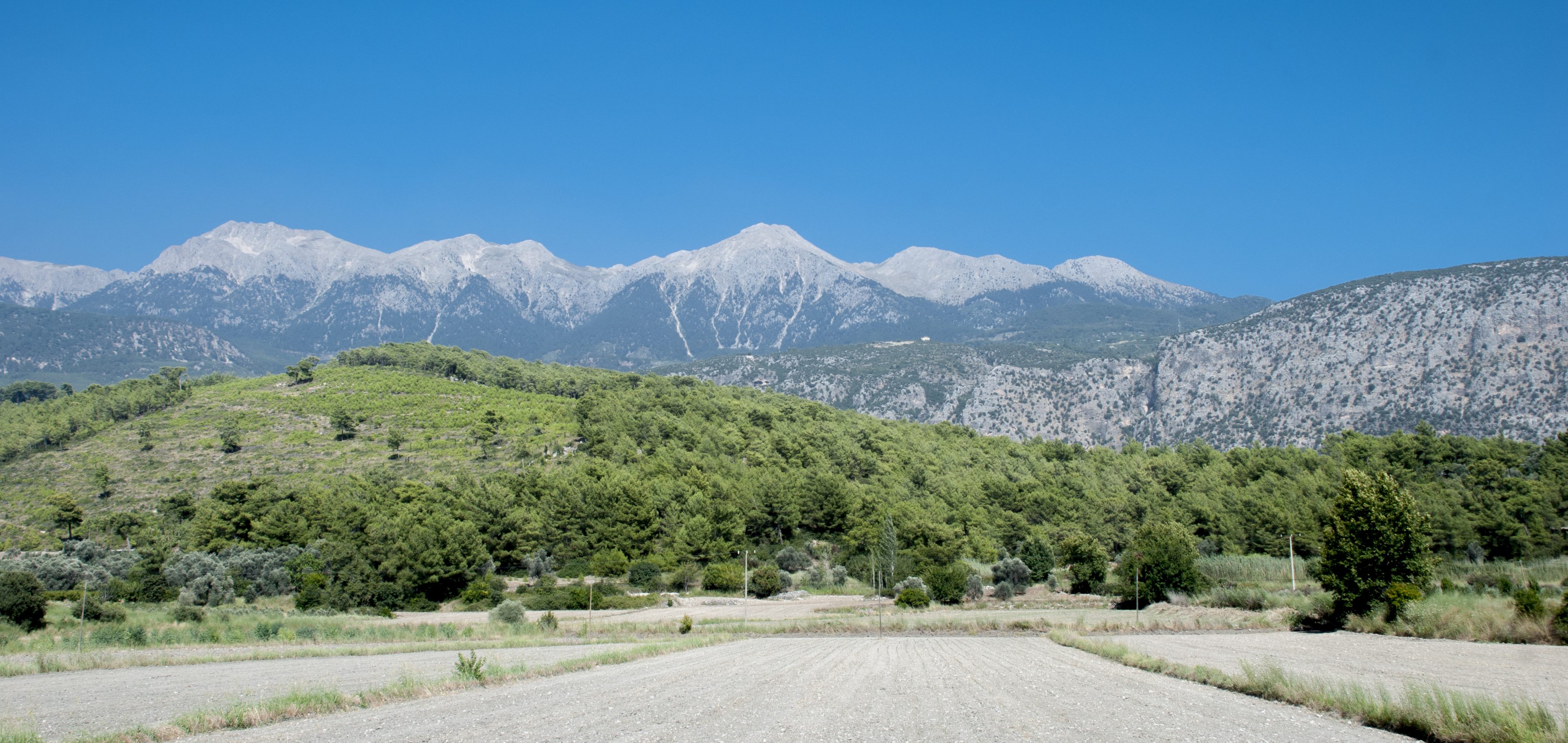 Fethiye-Saklıkent yolundan Akdağlar. Antalya-Muğla sınırı.